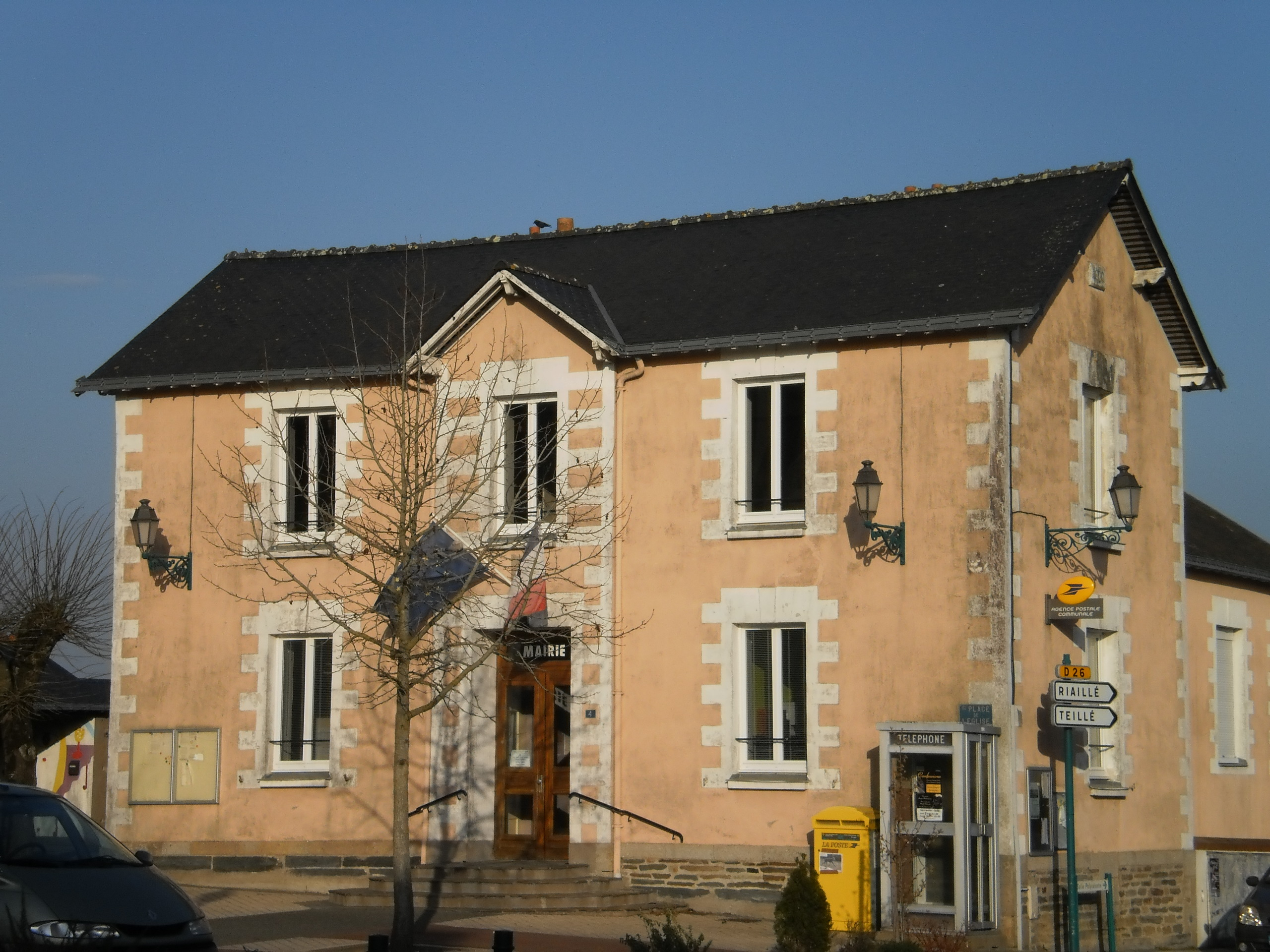 Trans-sur-Erdre (Loire-Atlantique, France) - mairie